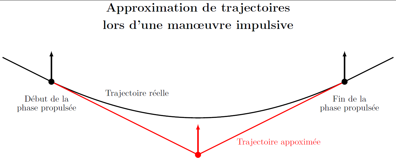 Approximation de trajectoires lors d'une manoeuvre orbitale impulsive.